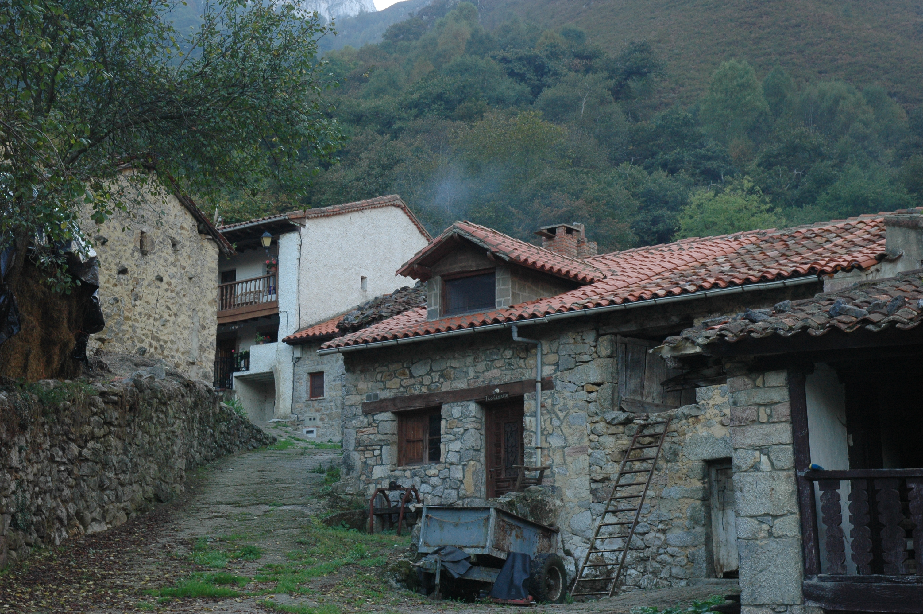 Vista parcial de San Esteban de Cuñaba (Peñamellera Baxa, Asturies).